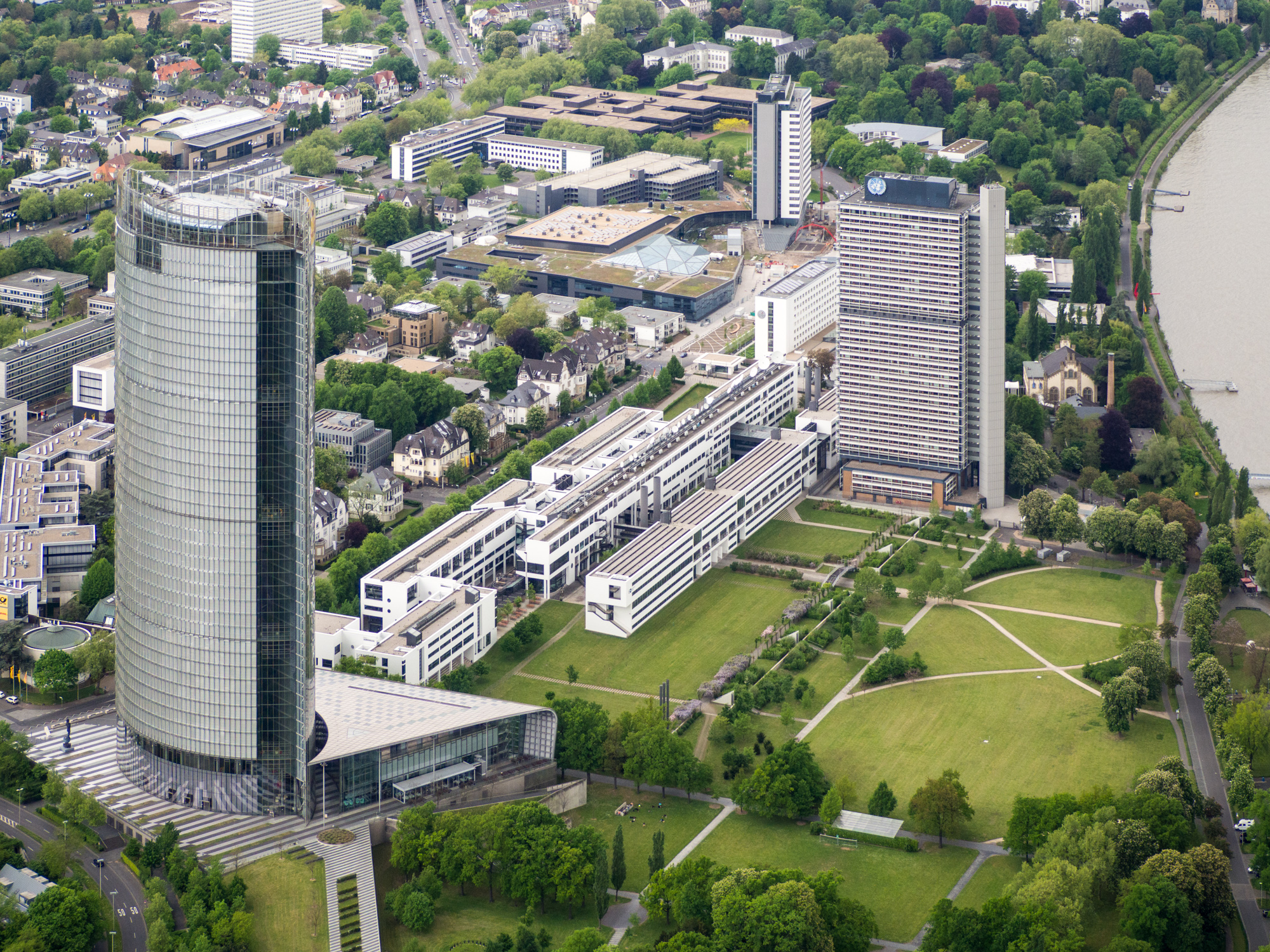 Luftaufnahme von Post Tower, Schürmann-Bau und Langer Eugen, Bonn-Gronau